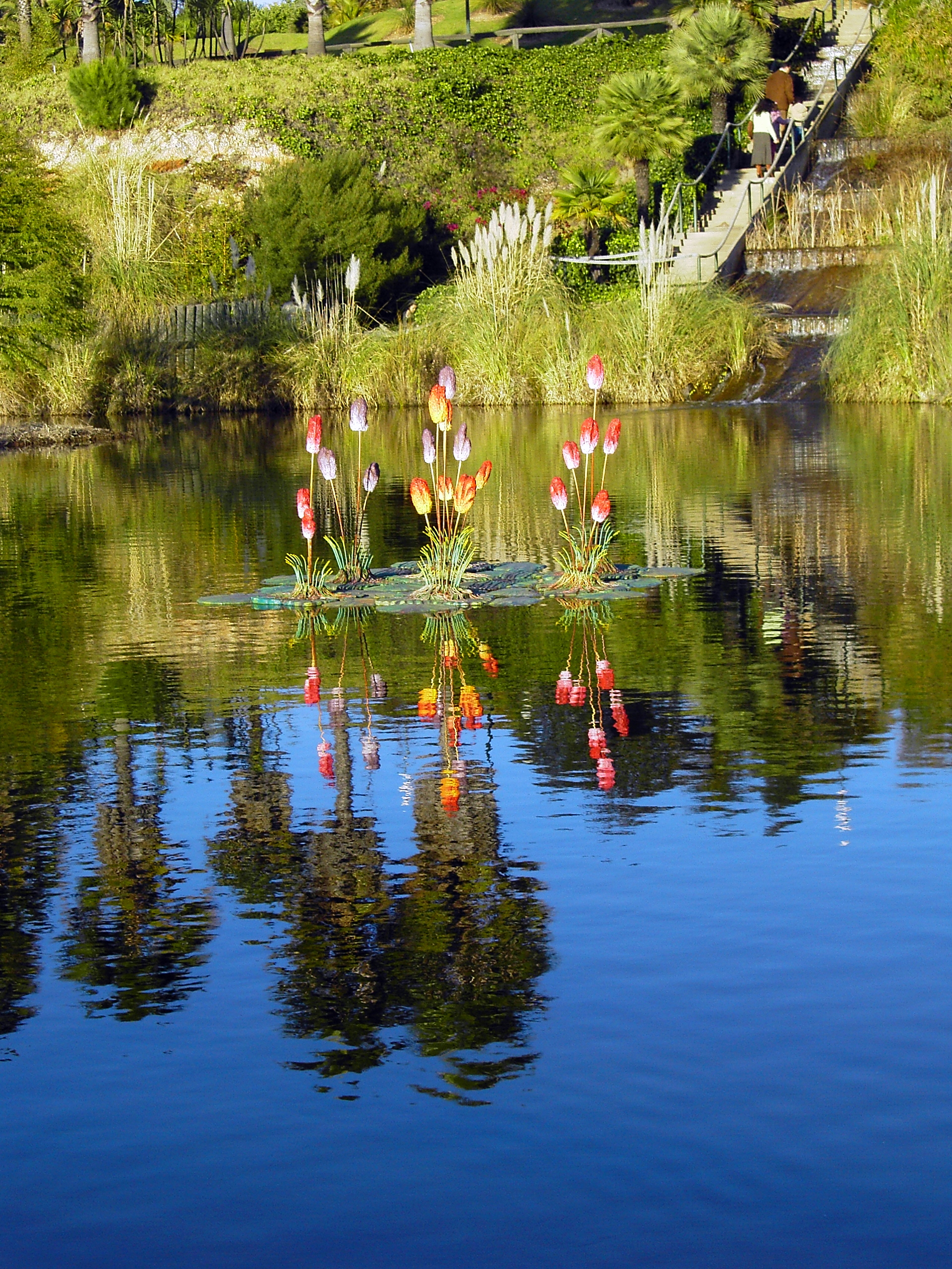 Parque botánico José Celestino Mutis. Palos de la Frontera (España)